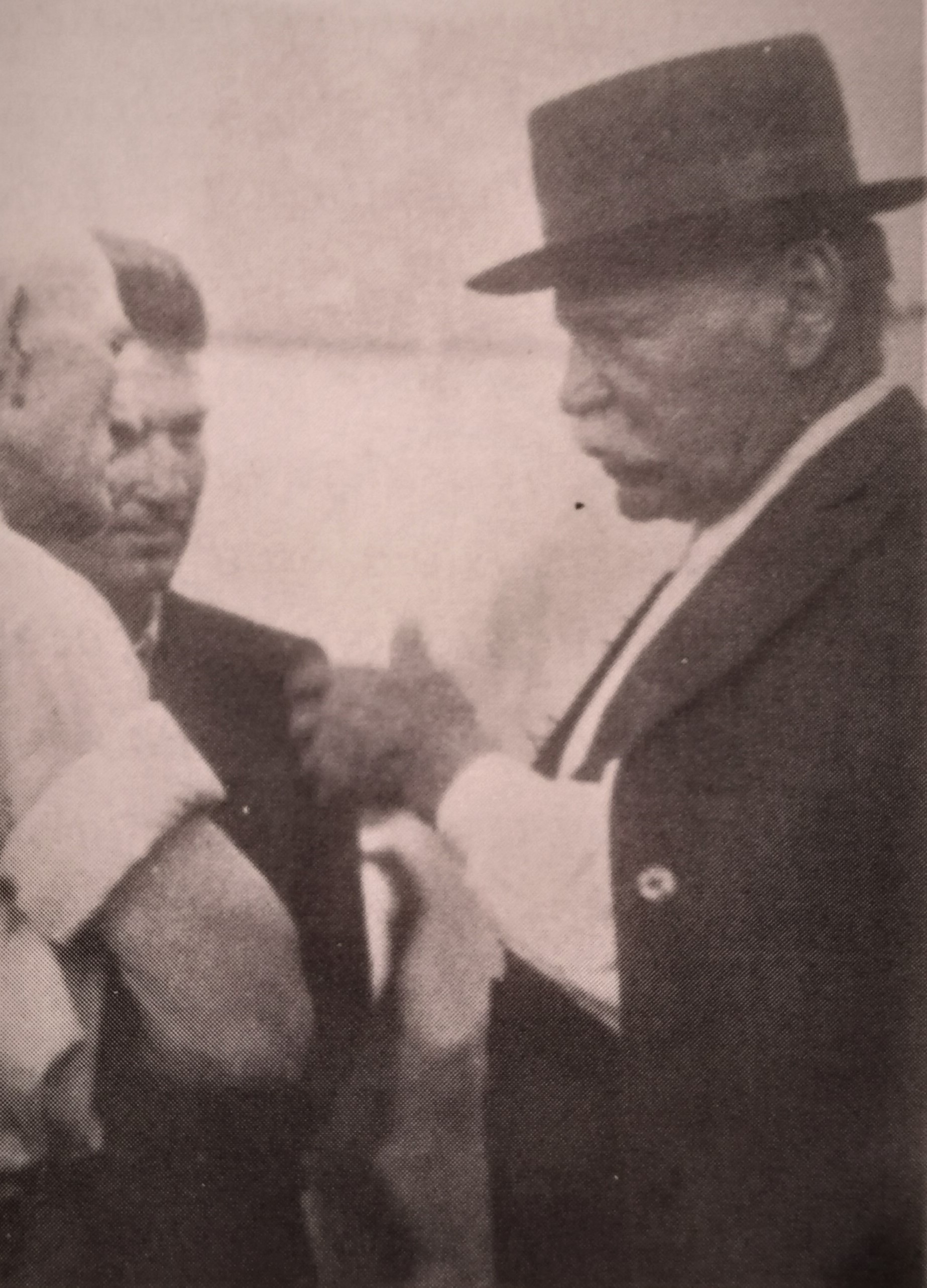 Mato Babogredac u poznim godinama